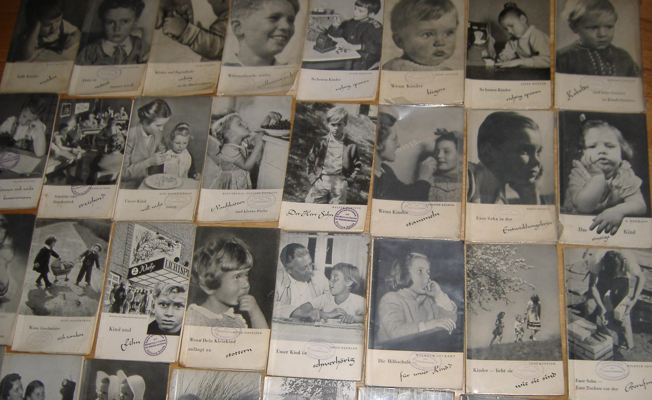 Reihe: Bedrohte Jugend, herausgegebn von Josef Spieler